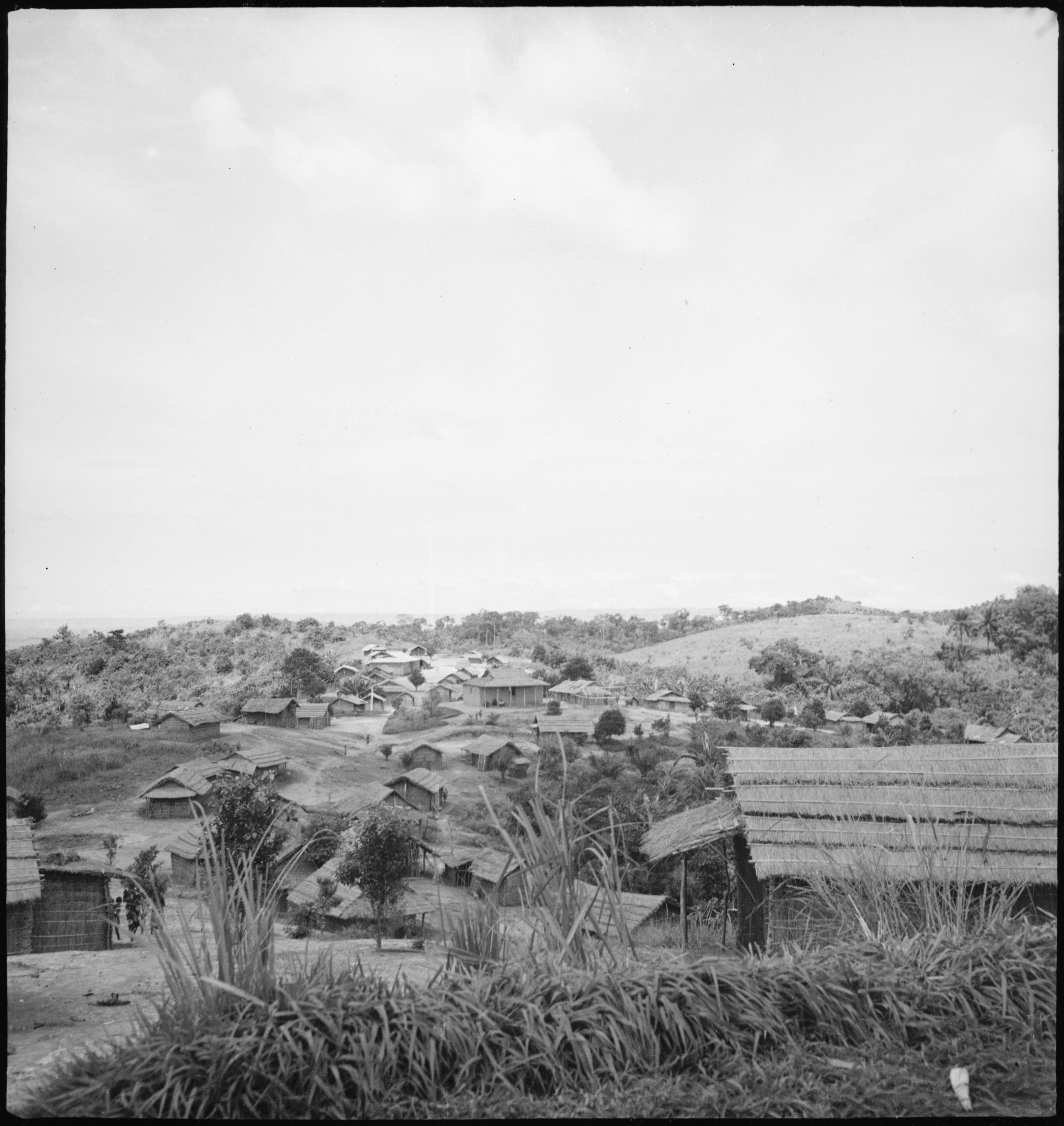 Belgisch-Kongo, bei Thysville (Mbanza Ngungu): Dorfansicht; Dorf auf einer Hügelebene bestehend aus mehreren Strohhütten